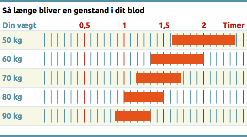 Så længe bliver alkohol i blodet